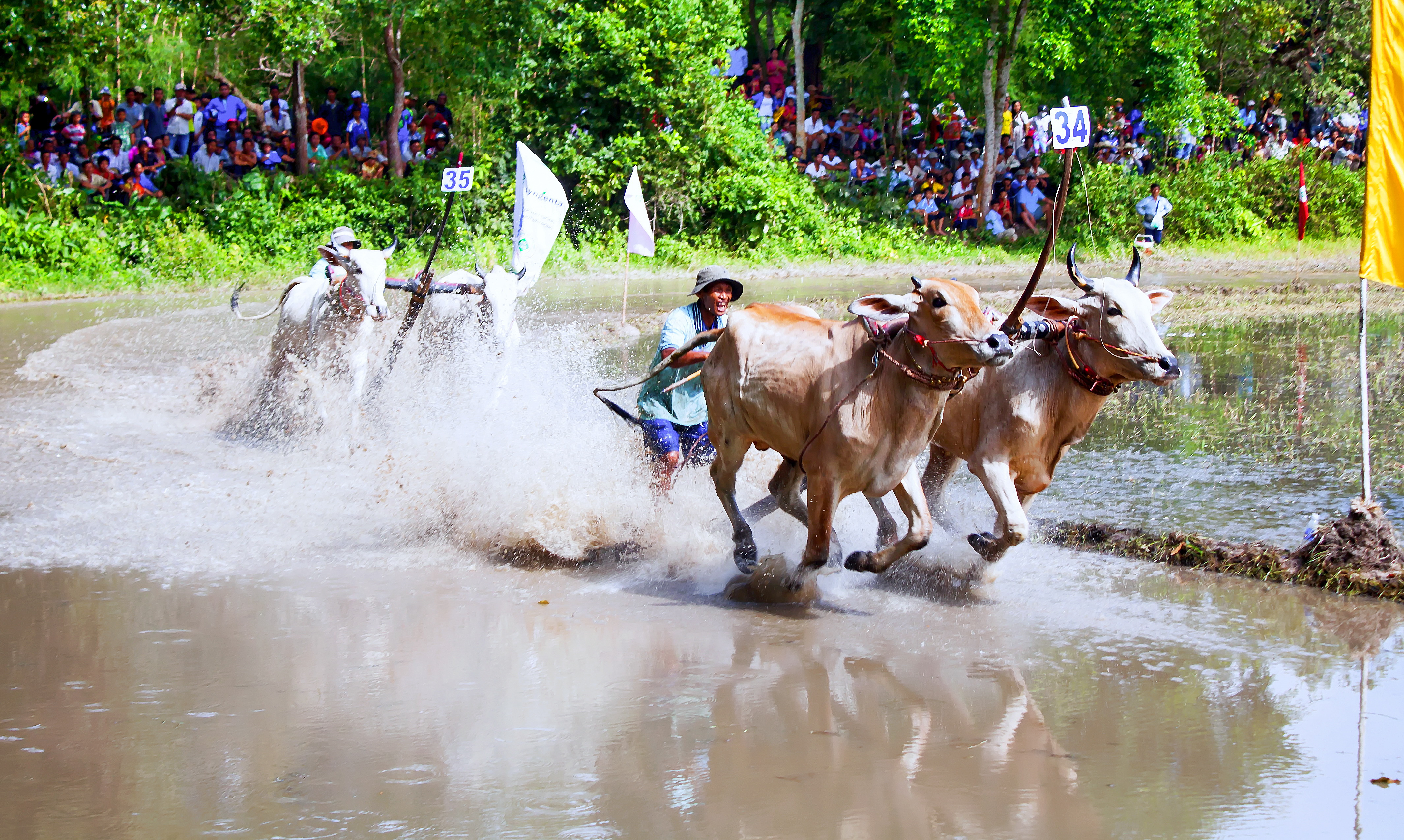 Một cảnh trong lễ hội đua bò ở vùng Bảy Núi được tổ chức vào tháng 9 năm 2014 tại chùa Tà Miệt, thuộc xã Lương Phi, H.Tri Tôn, An Giang, Việt Nam.